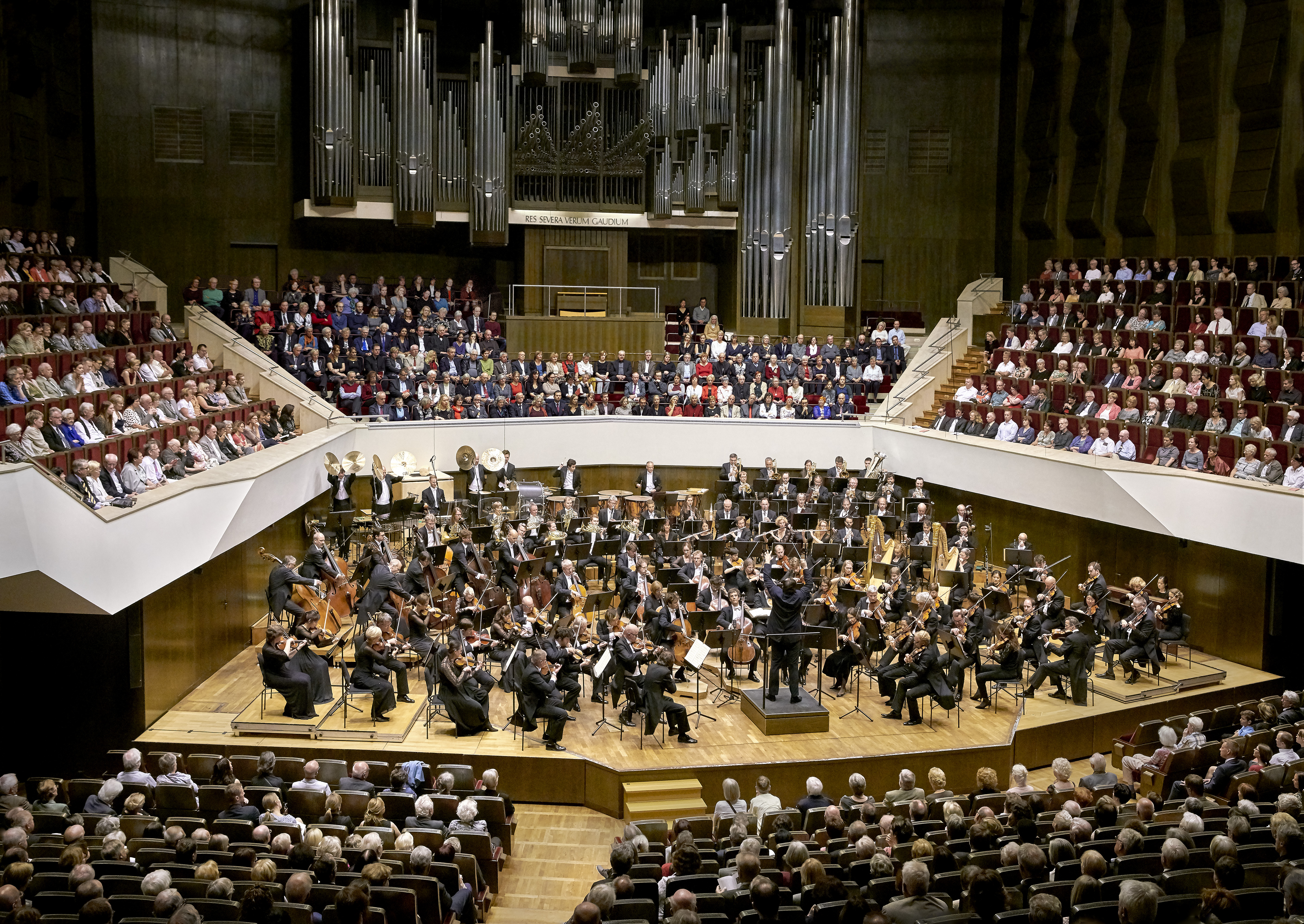 Gewandhausorchester, Großer Saal des Gewandhauses zu Leipzig